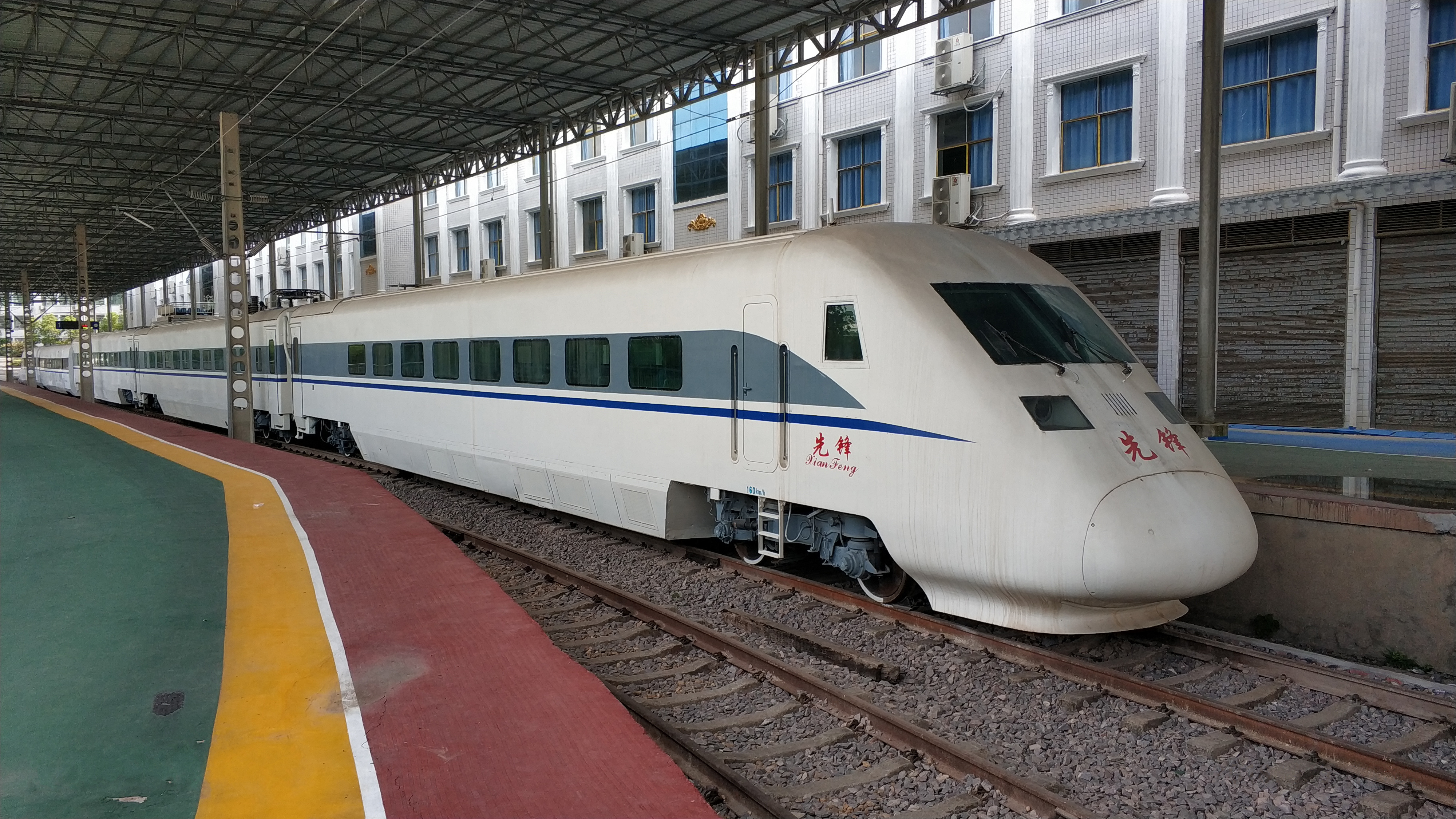 中文（中国大陆）: 总览（其中三节）